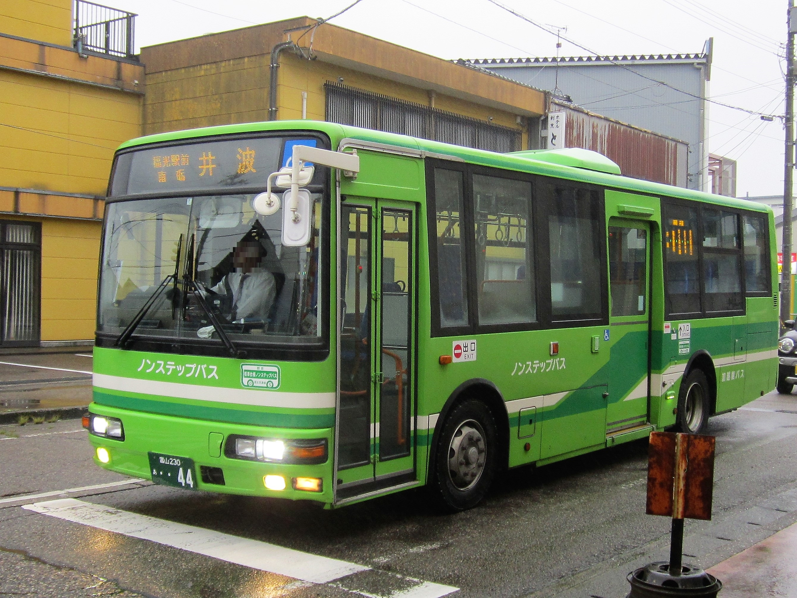 福光市街地を走行する加越能バス Canon PowerShot A2200